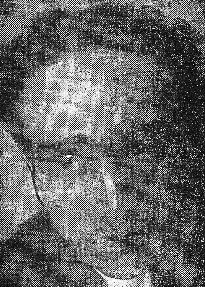 "Raymond Lefebvre".